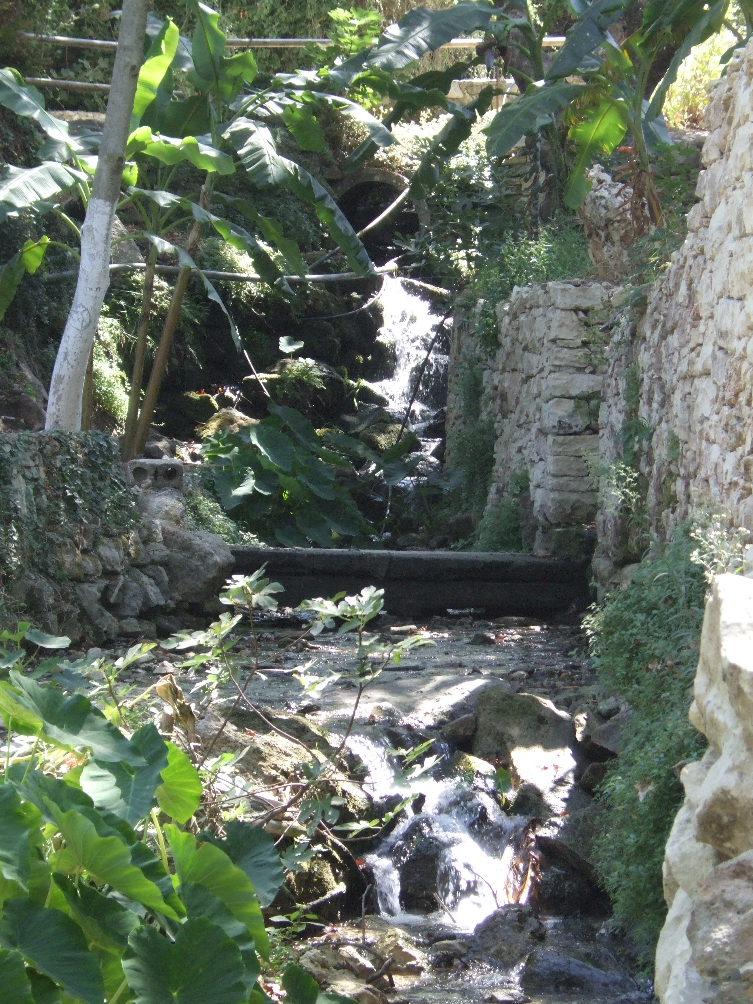 Ancien Moulin à Argiroupoli